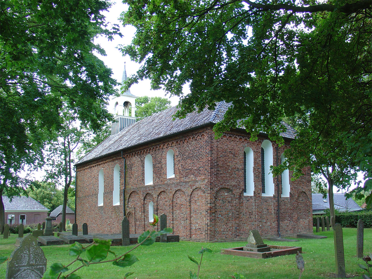 Zaalkerk van Wirdum